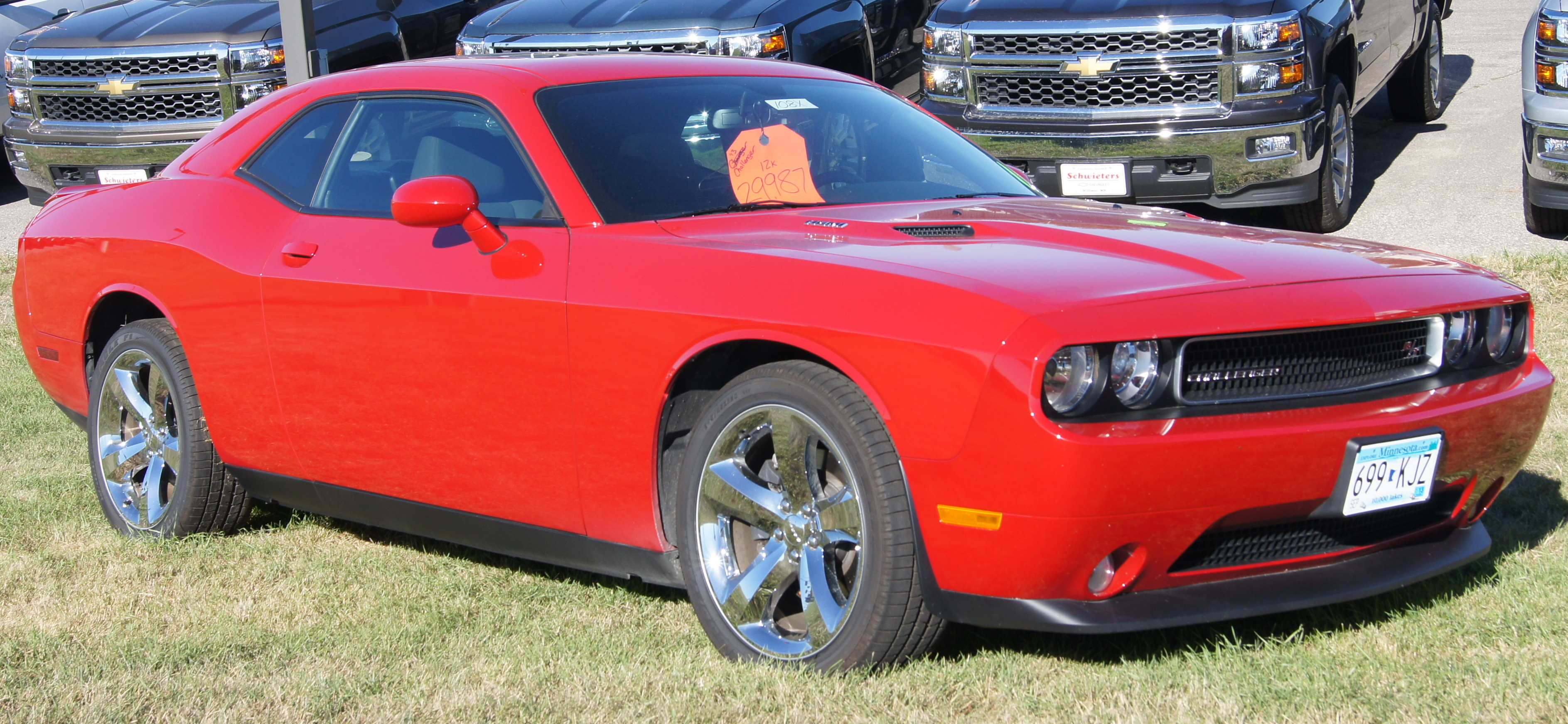 2013 Dodge Challenger R/T